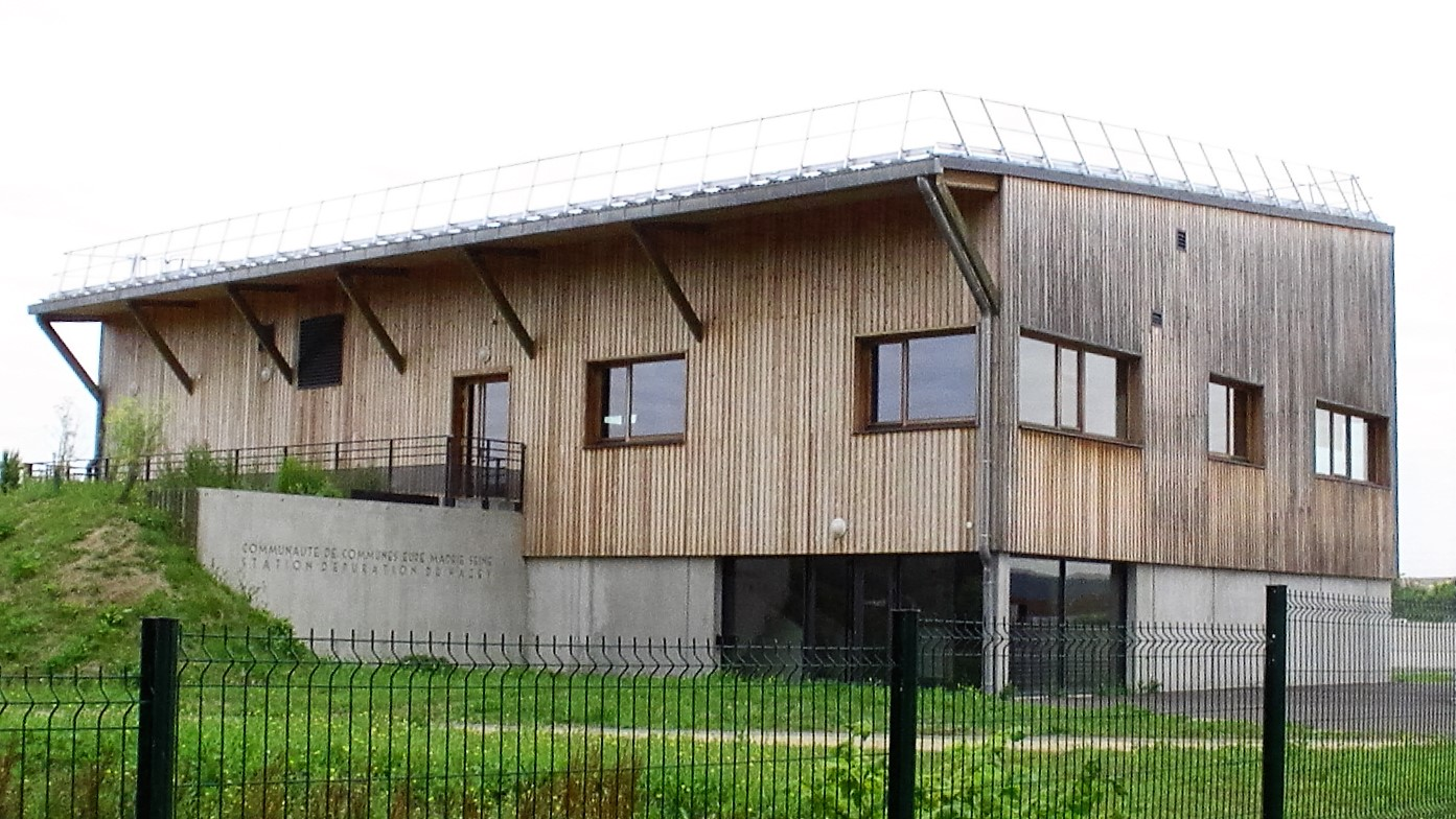 Station d'épuration du Hazey - Aubevoye - Eure